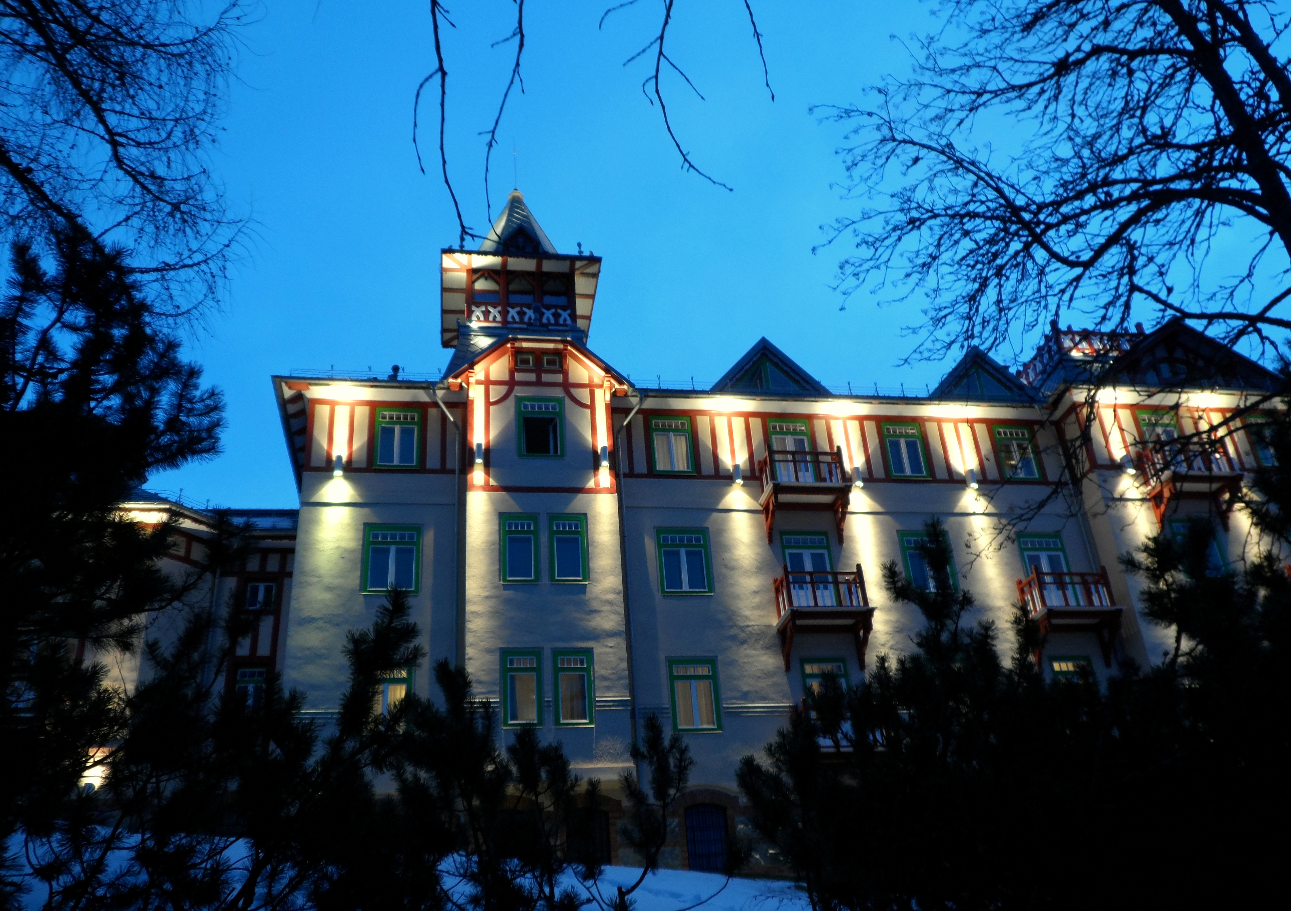 Grand Hotel Kempinski High Tatras